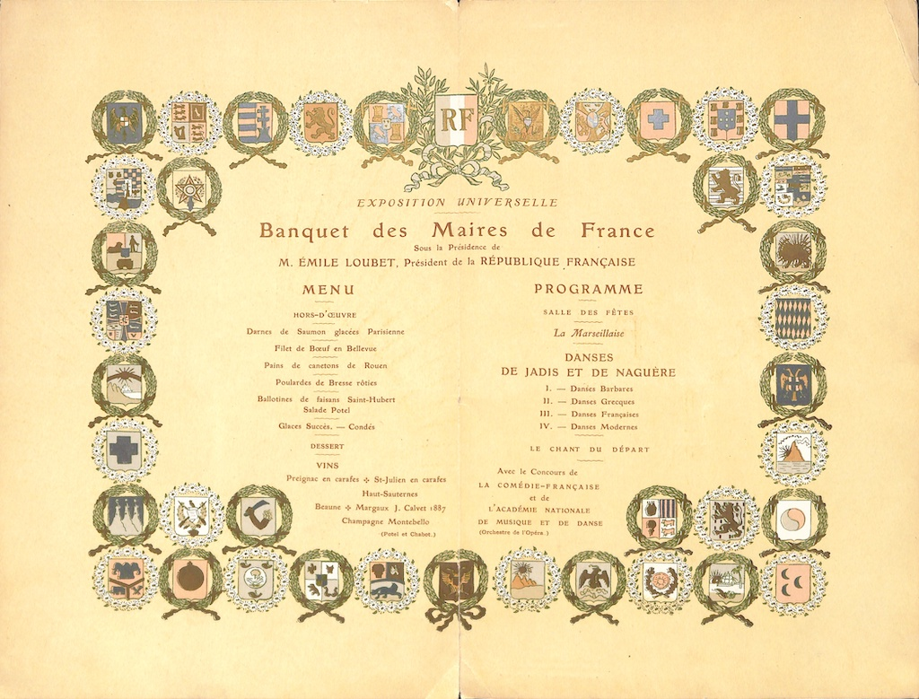 Menu du Banquet des Maires de France lors de l'Exposition Universelle le 22 septembre 1900 sous la présidence d'Émile LOUBET, Président de la République Française. Menu et programme